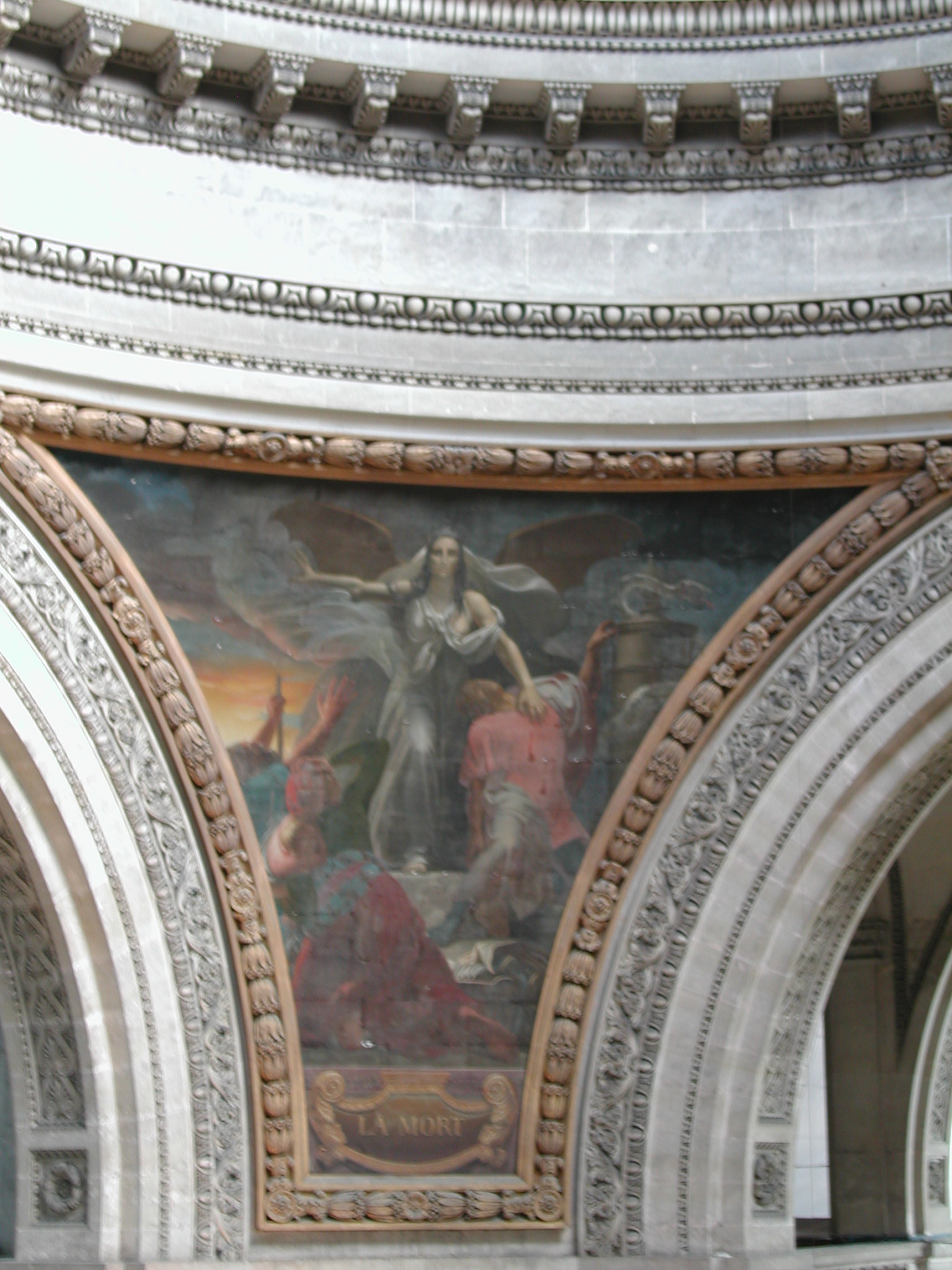 Description Peinture de Carvallo à partir d'un dessin de Gérard. Placé sur un des pendentifs de la coupole du Panthéon de Paris. ? Peinture de Carvallo à partir d'un dessin de Gérard. Placé sur un des pendentifs de la coupole du Panthéon de Paris.